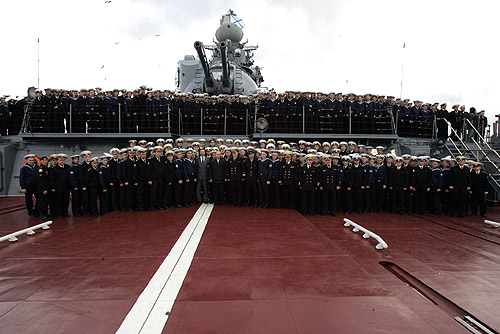 БАРЕНЦЕВО МОРЕ. Владимир Путин с командой тяжелого атомного ракетного крейсера «Петр Великий» по окончании учений Северного флота.